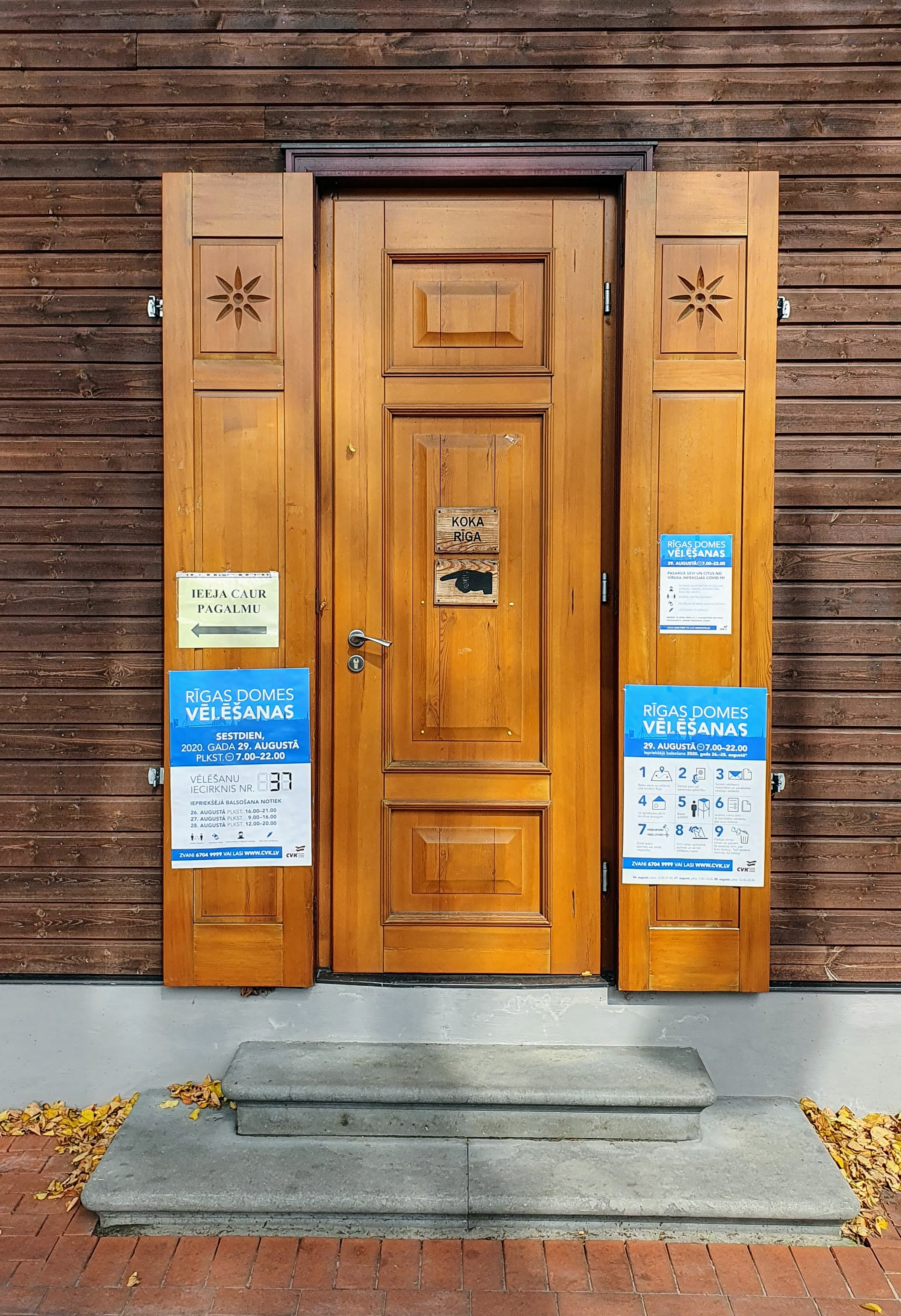 2020. gada Rīgas domes vēlēšanu 37. iecirkņa plakāts uz "Koka Rīgas" durvīm